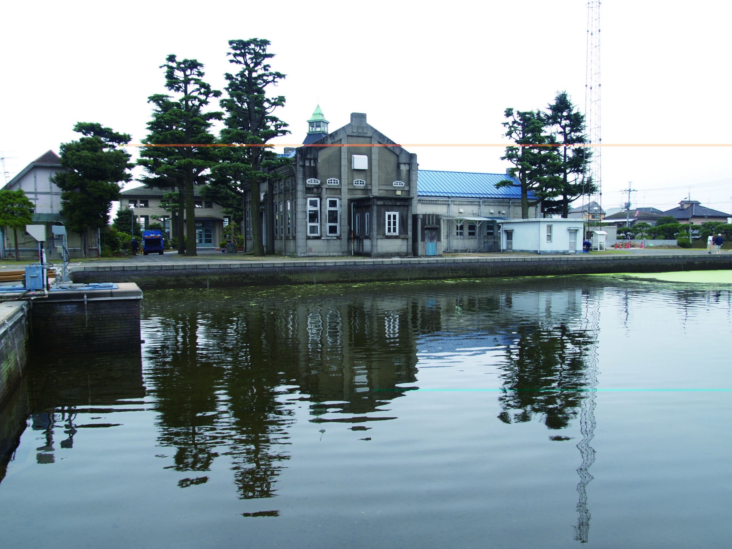 砧下浄水所 濾過池